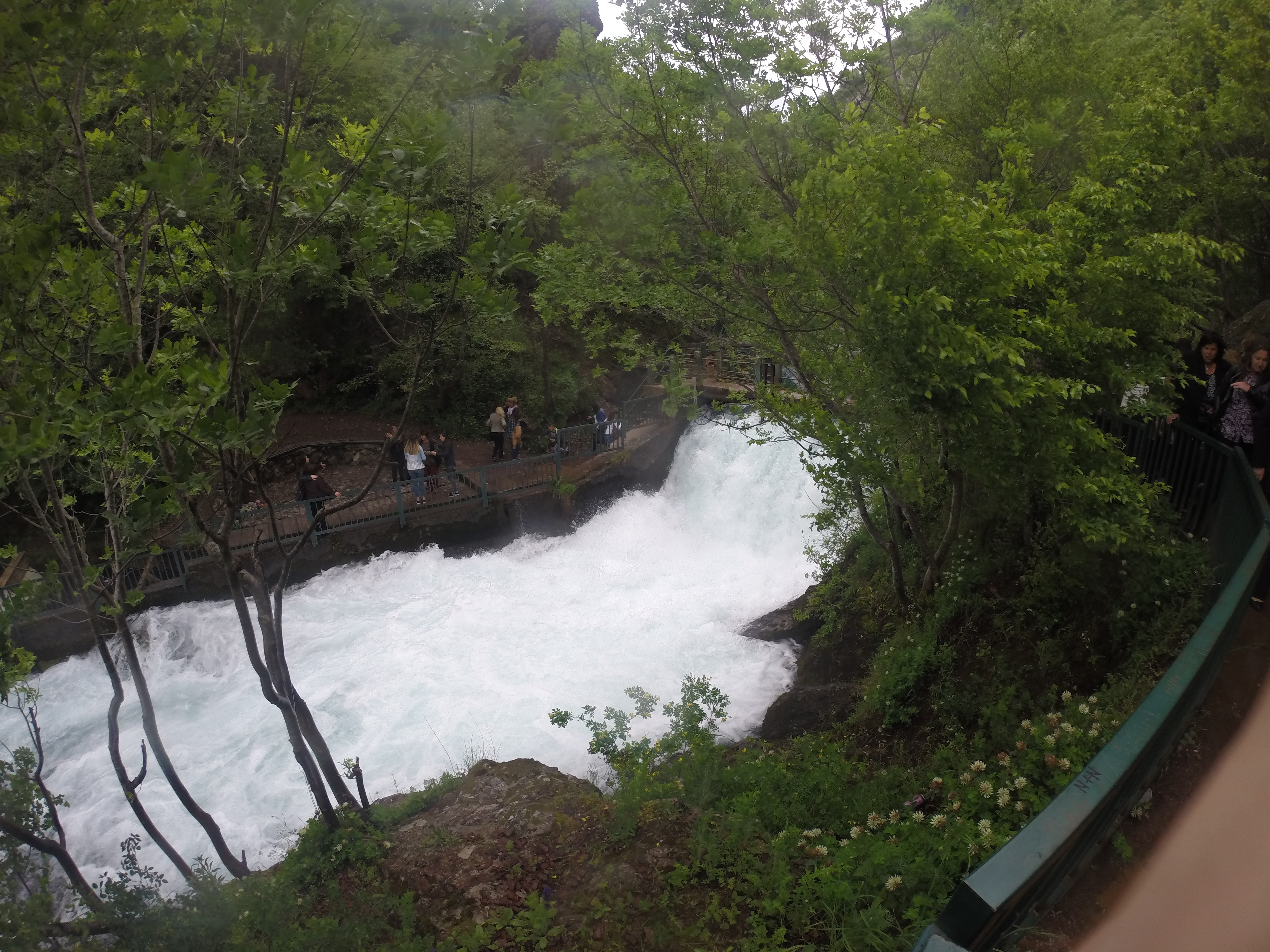 Burimi i Drinit të Bardhë dhe Shpella e Radavcit, Pejë